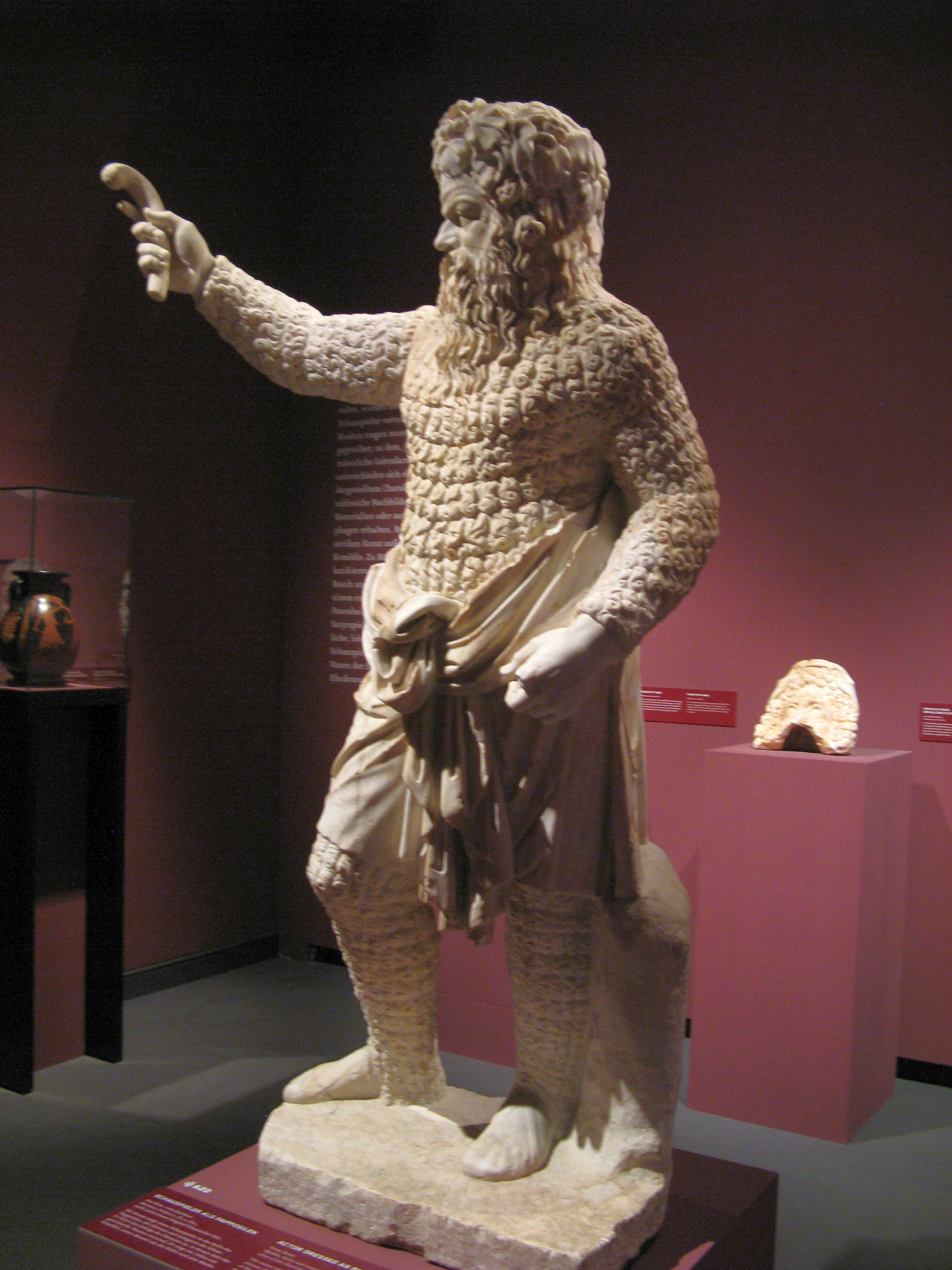 Schauspieler als Papposilen, geschaffen im frühen 2. Jahrhunderts nach einer Vorlage aus Klassischer Zeit, 1739 aus der Sammlung Gentili in Rom für die Antikensammlung Berlin/Pergamonmuseum erworben, Marmor, Höhe 1,68m, Inventarnummer SMB Sk 278